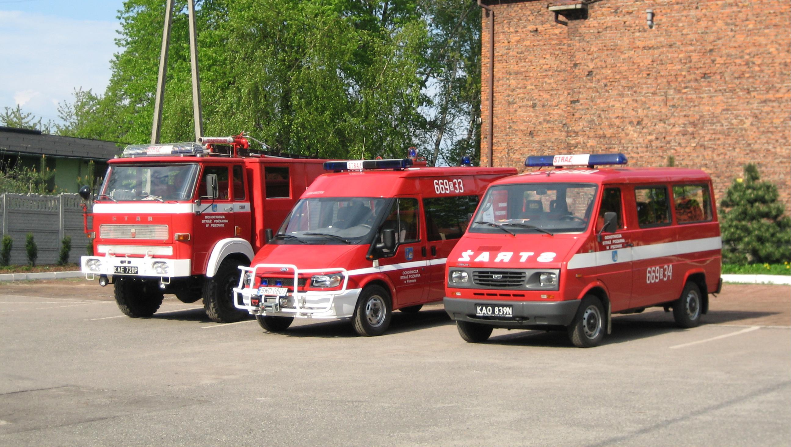 Zdjęcie pojazdów pożarniczych OSP w Pszowie. Wutor Daro998.